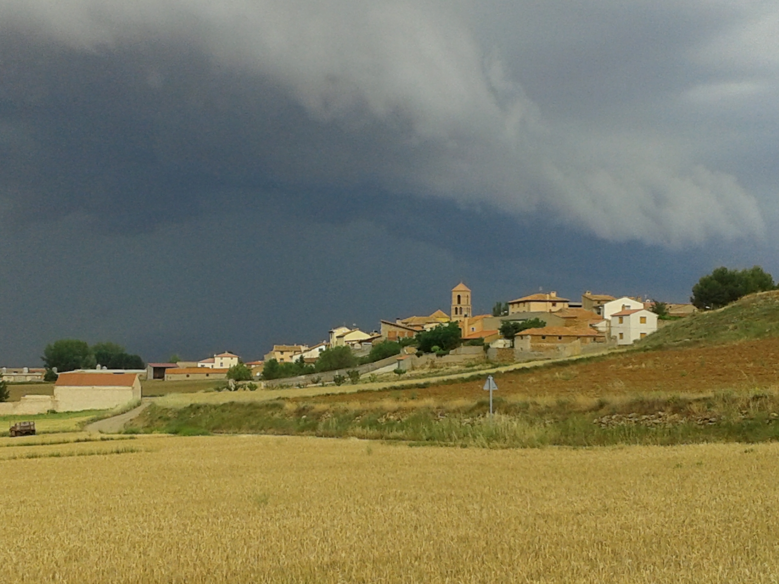 Gallocanta herria aintziratik.